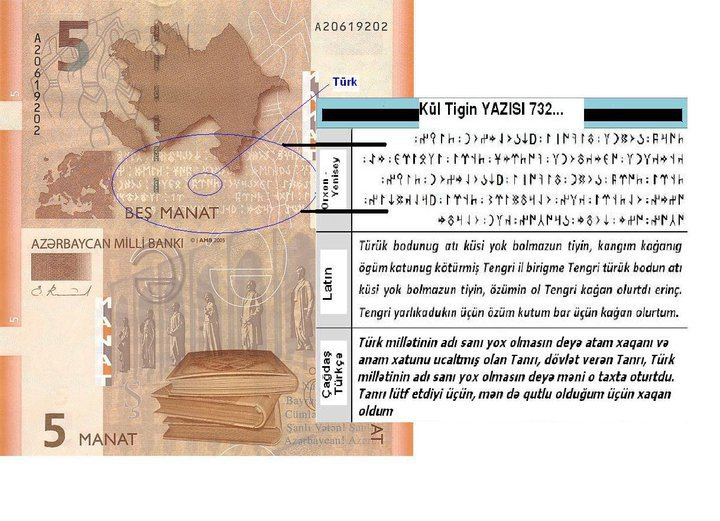 Beş manatlıq Azərbaycan əskinasında Gül Tigin qədim türk kitabəsindən fraqmentin oxunması